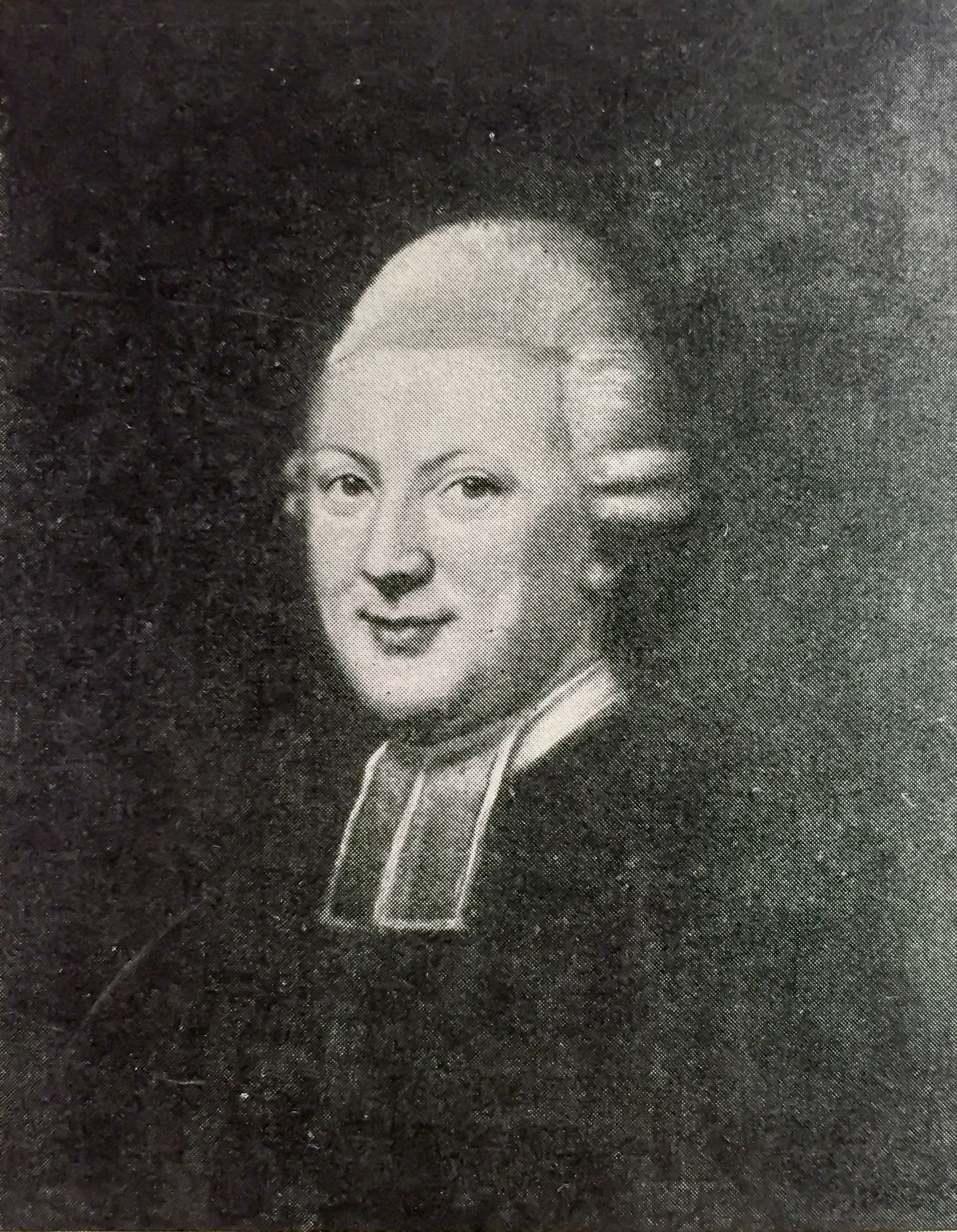 Friedericke Julie Lisiewski: Oberkonsistorialrat Zöllner. In Marienkirche, Berlin, heute verschollen